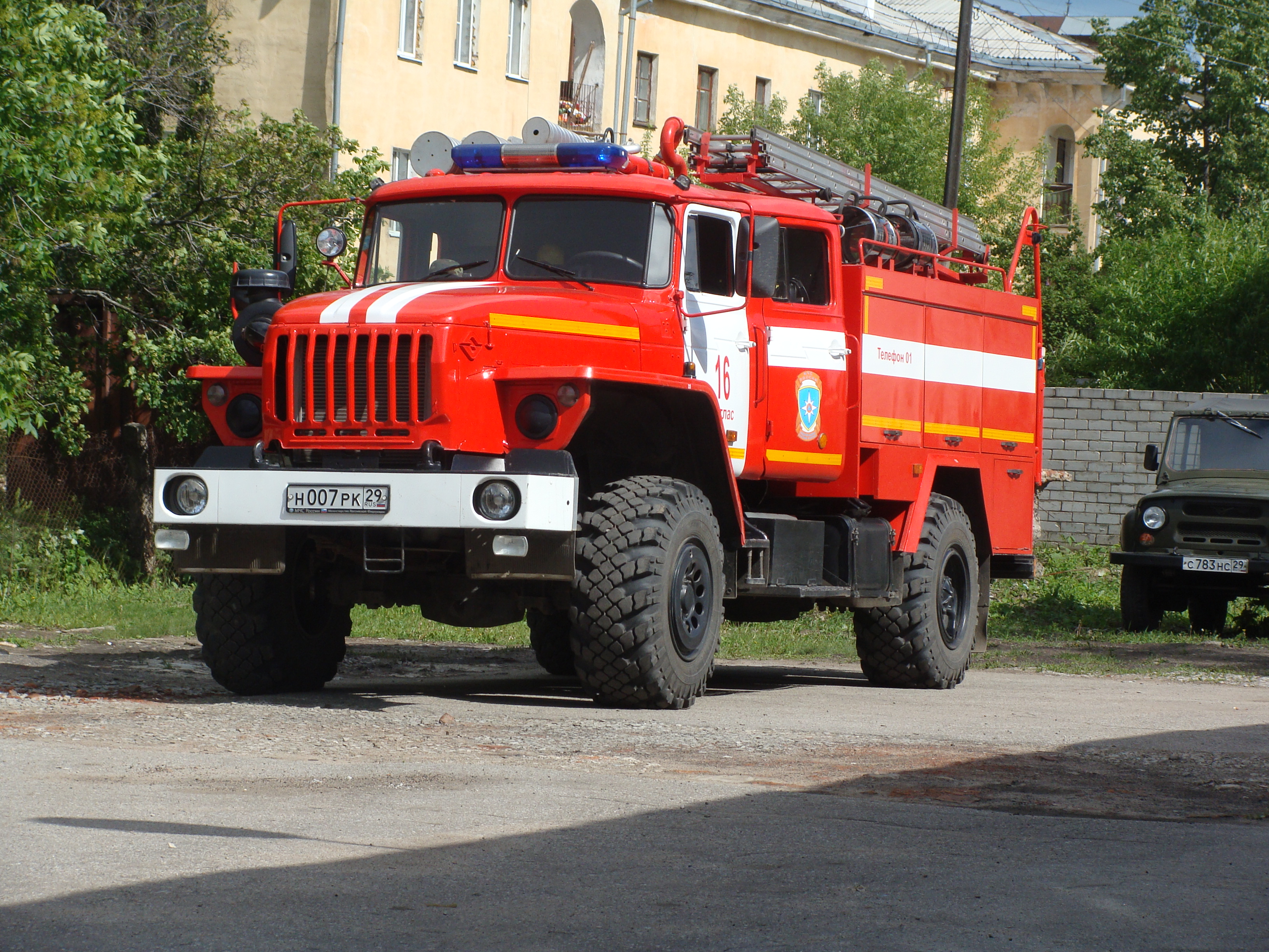 АЦ на шасси УРАЛ, ПЧ-16, Котлас